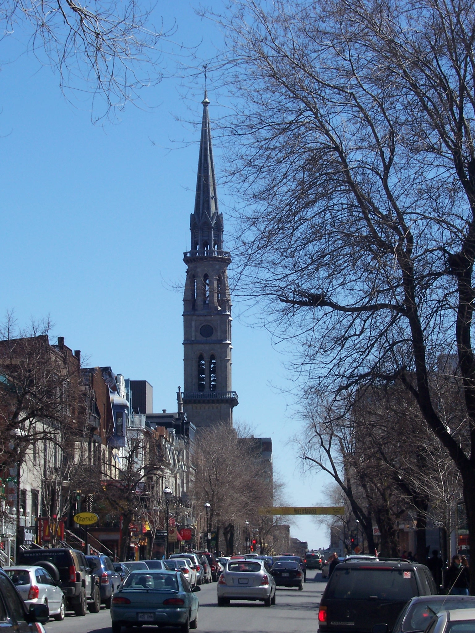 Photo du clocher de l'ancien clocher de la Cathédrale Saint-Jacques de Montréal, maintenant intégré à un pavillon de l'UQAM